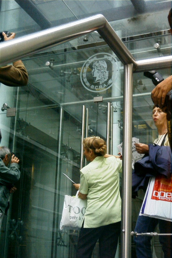 Manifestación de ahorristas argentinos contra el Corralito financiero. Una manifestante golpea la puerta de una de las entradas del Banco Central, en la calle Reconquista entre Perón y Sarmiento, Buenos Aires, Argentina.